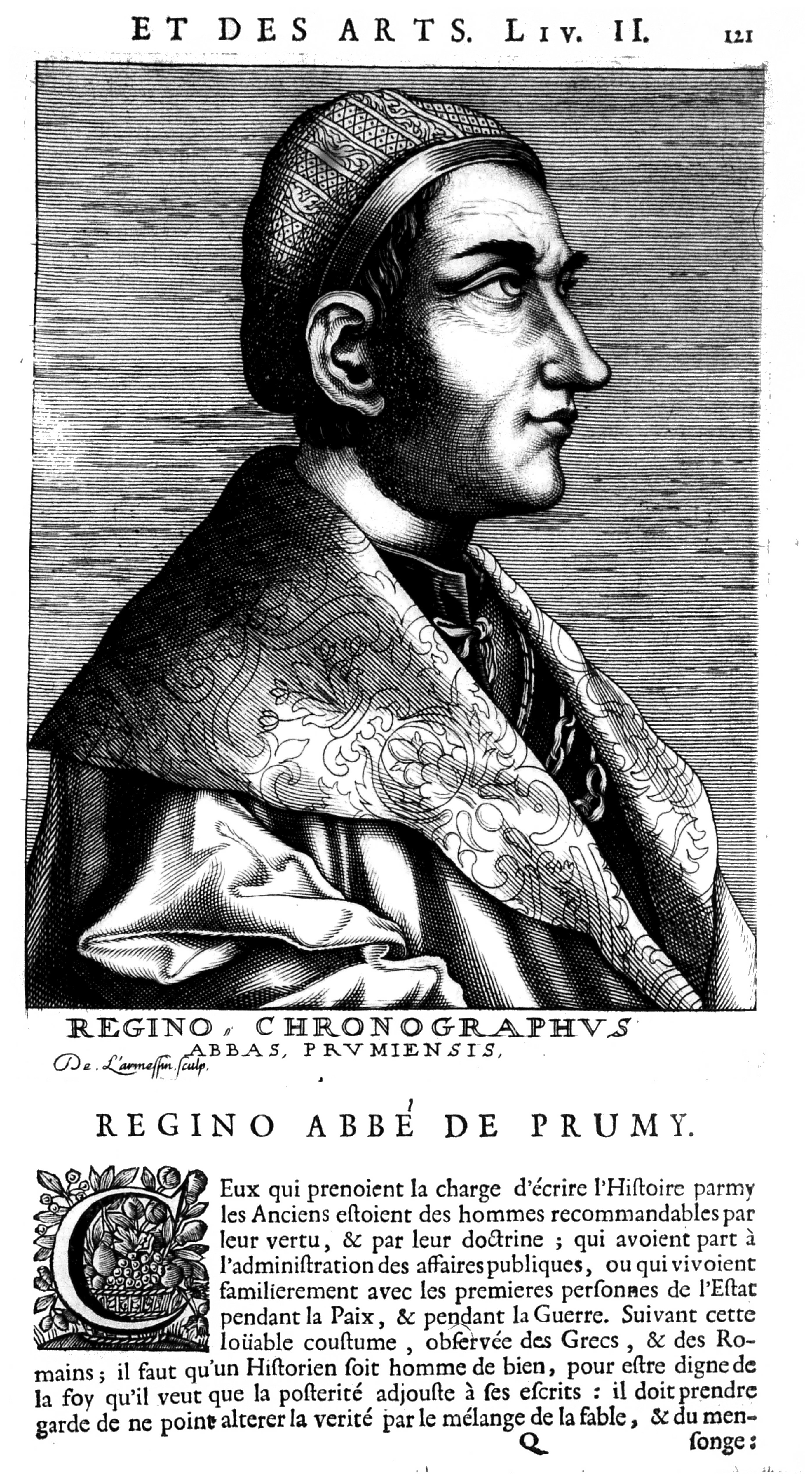 dessin de Reginon de Prun issu de "Académie des sciences et des arts, livre II, p121".